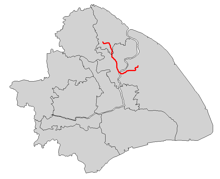 上海轨道交通7号线简图 本地图的底图不表示上海市全部所辖区域 因版面关系，上海市所辖之崇明岛、长兴岛等与本线路无关的离岛未在本图中表示。